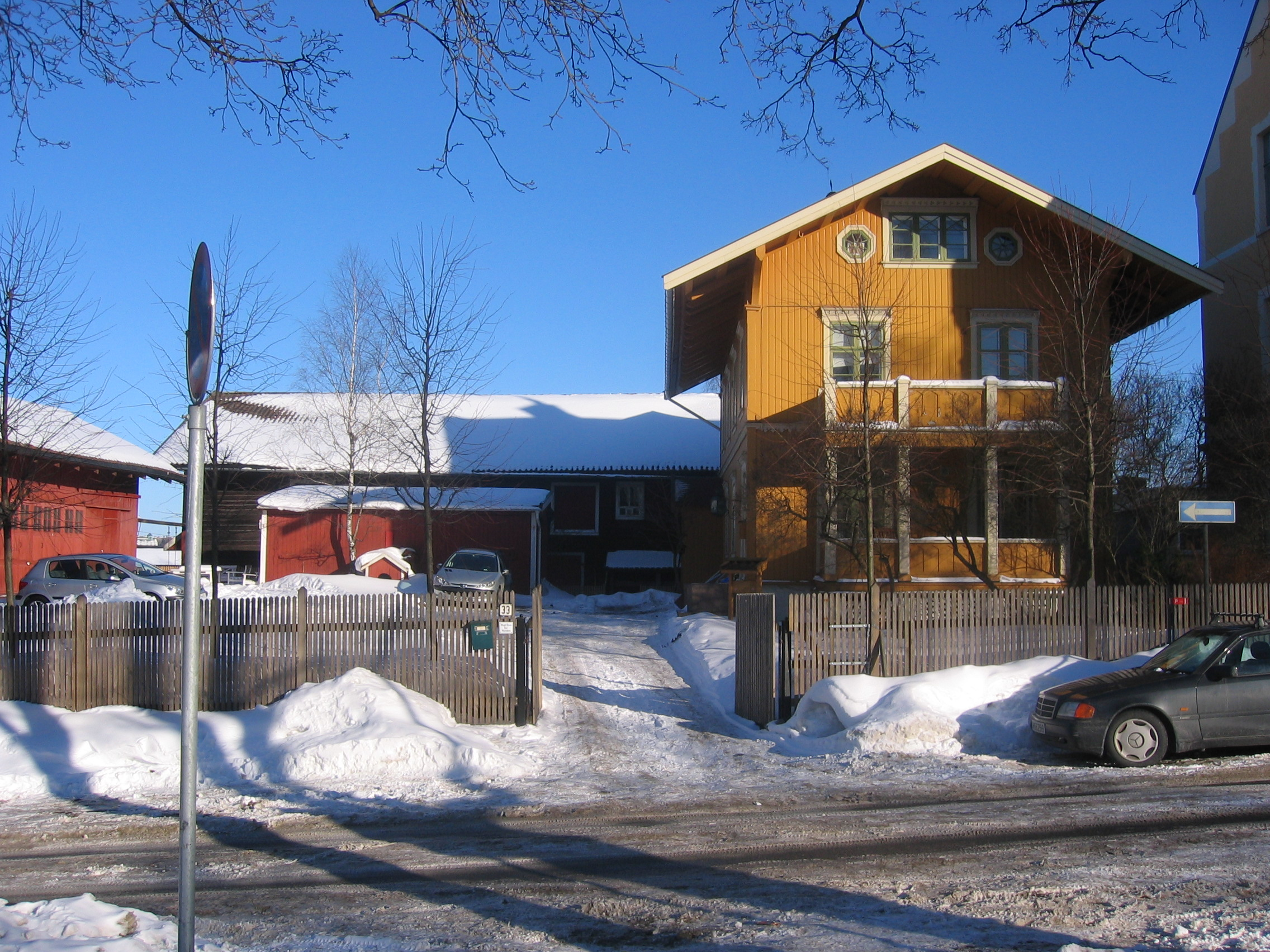 Nicolailøkken (Voldeløkken), Geitmyrsveien, St. Hanshaugen, Oslo